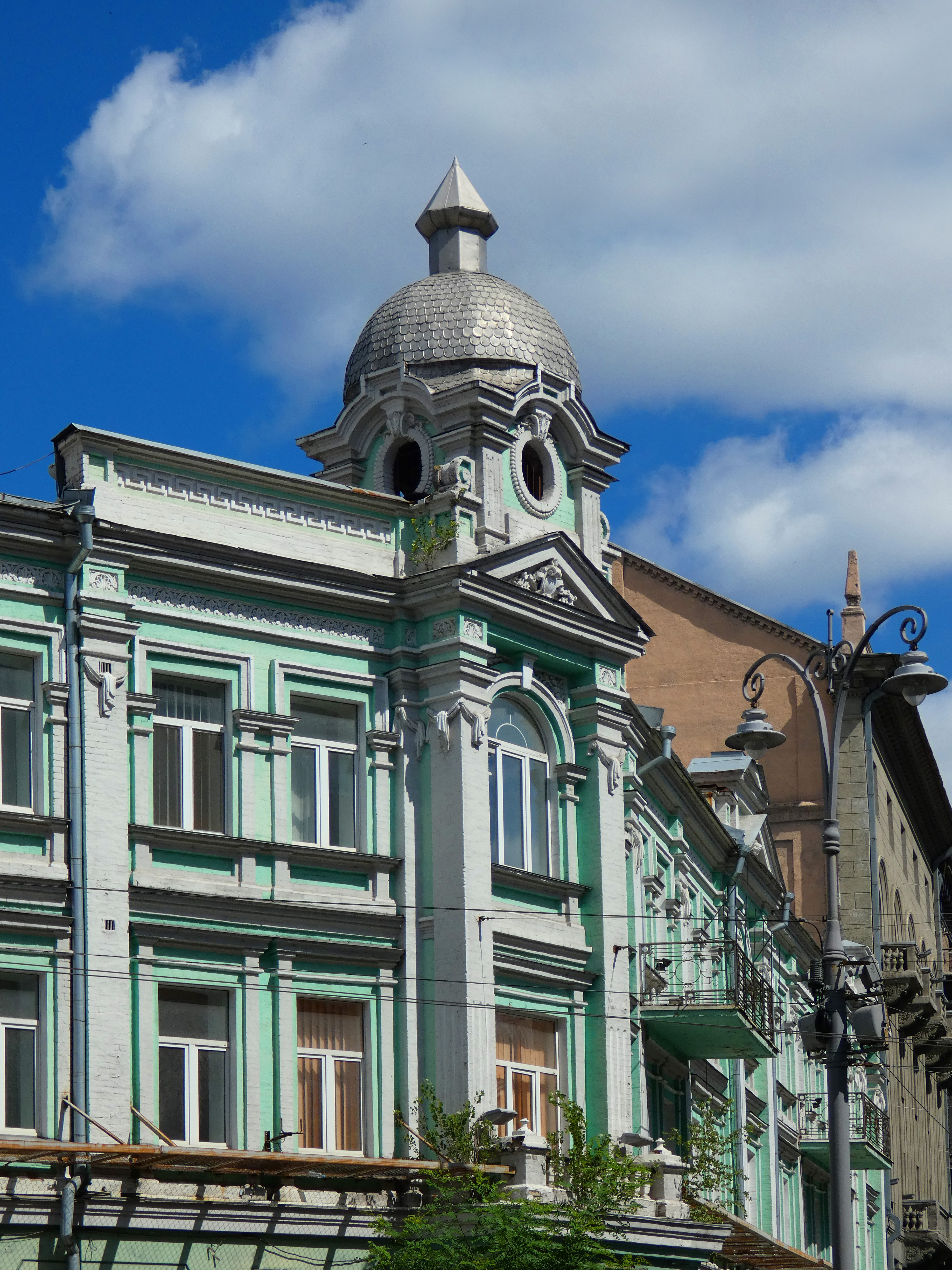 Еркер. Будинок Фалера. Великій Васильківська вулиця, 10. Київ